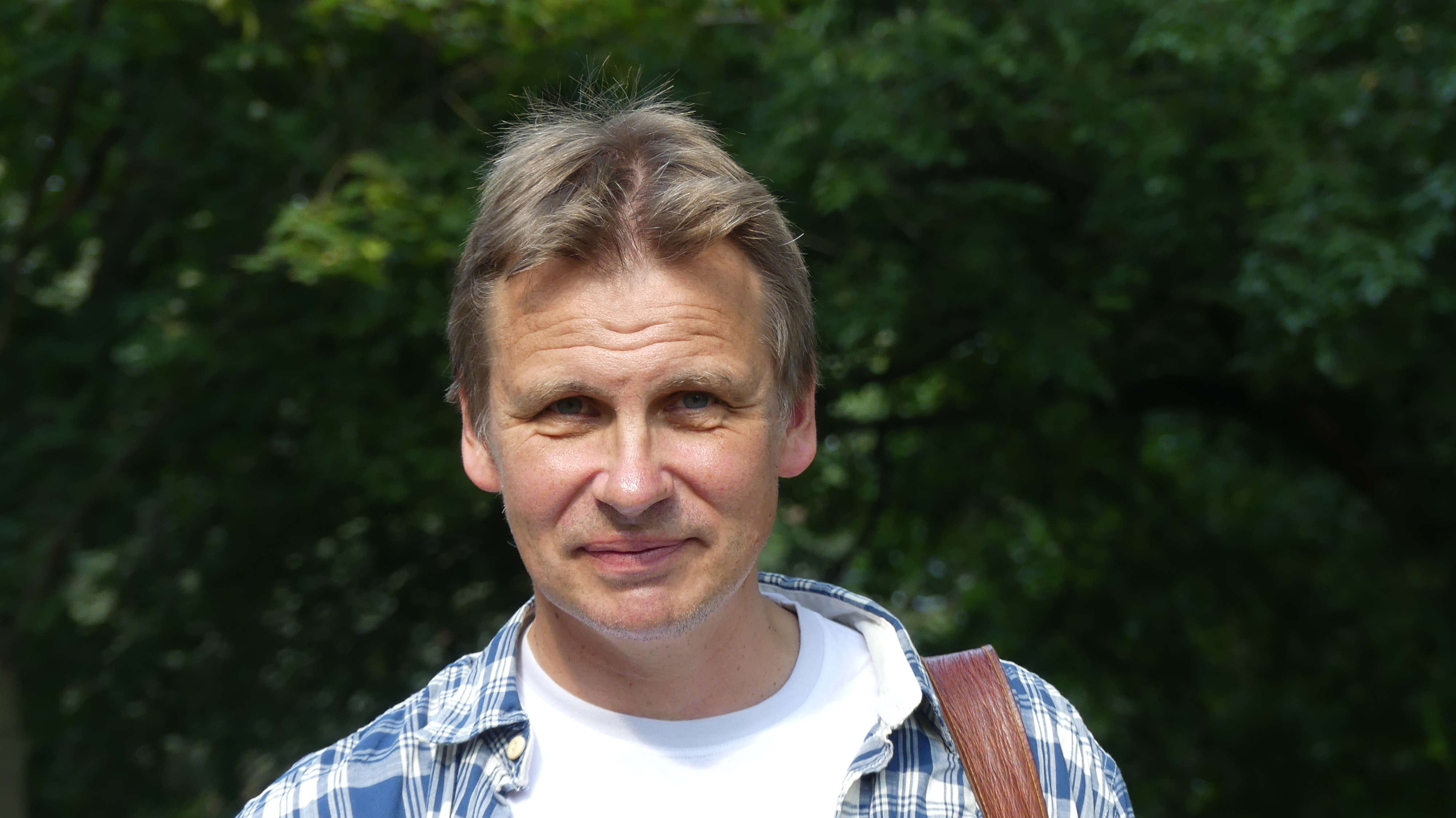 Jakob Wegelius at the gelbe Villa in Berlin during his participation at the section International Children´s and Young Adult Literature of the 16th International Literature Festival Berlin on September 11, 2016